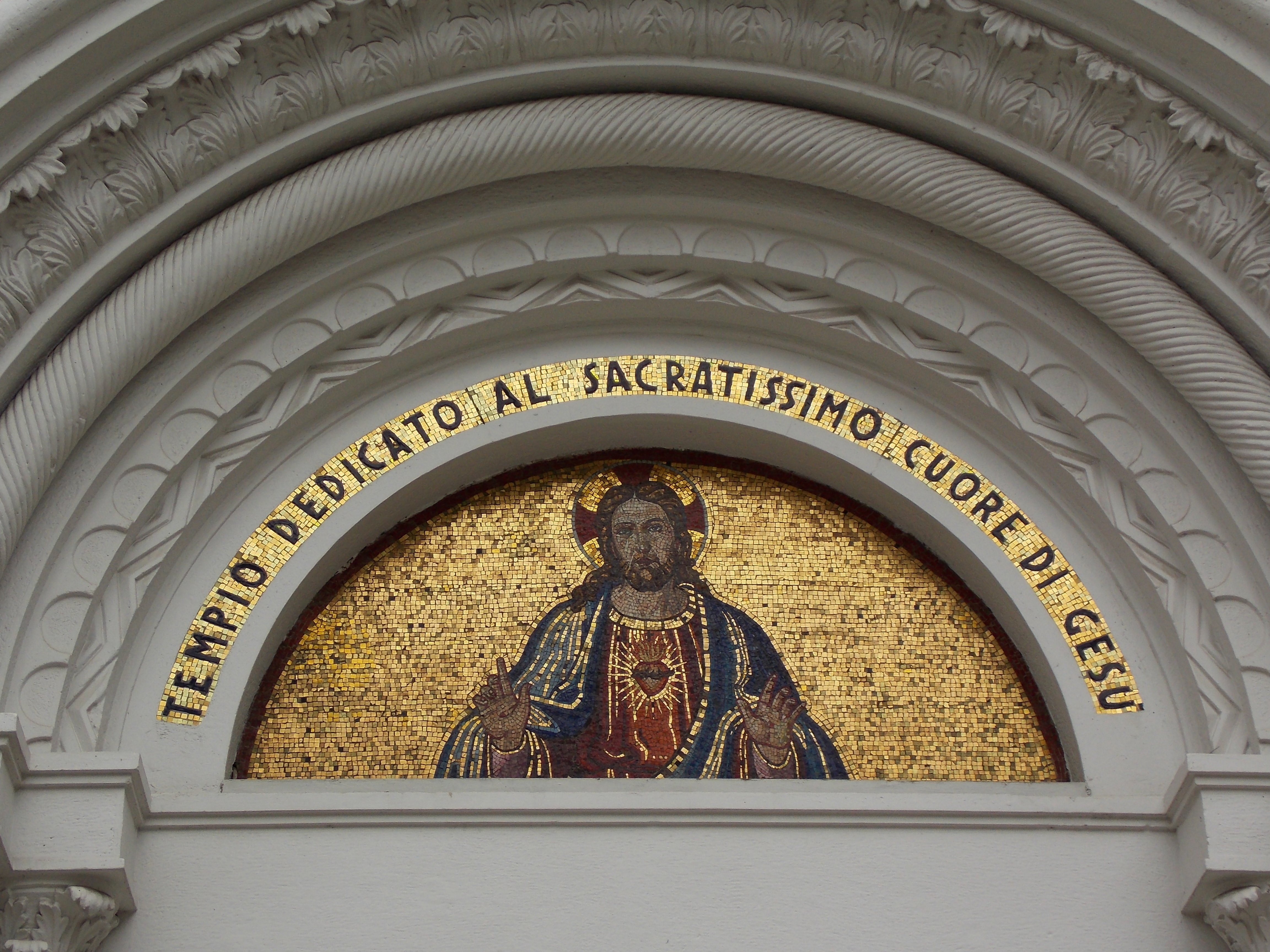 Salerno, chiesa del Sacro Cuore, il mosaico posto sopra il portale principale.